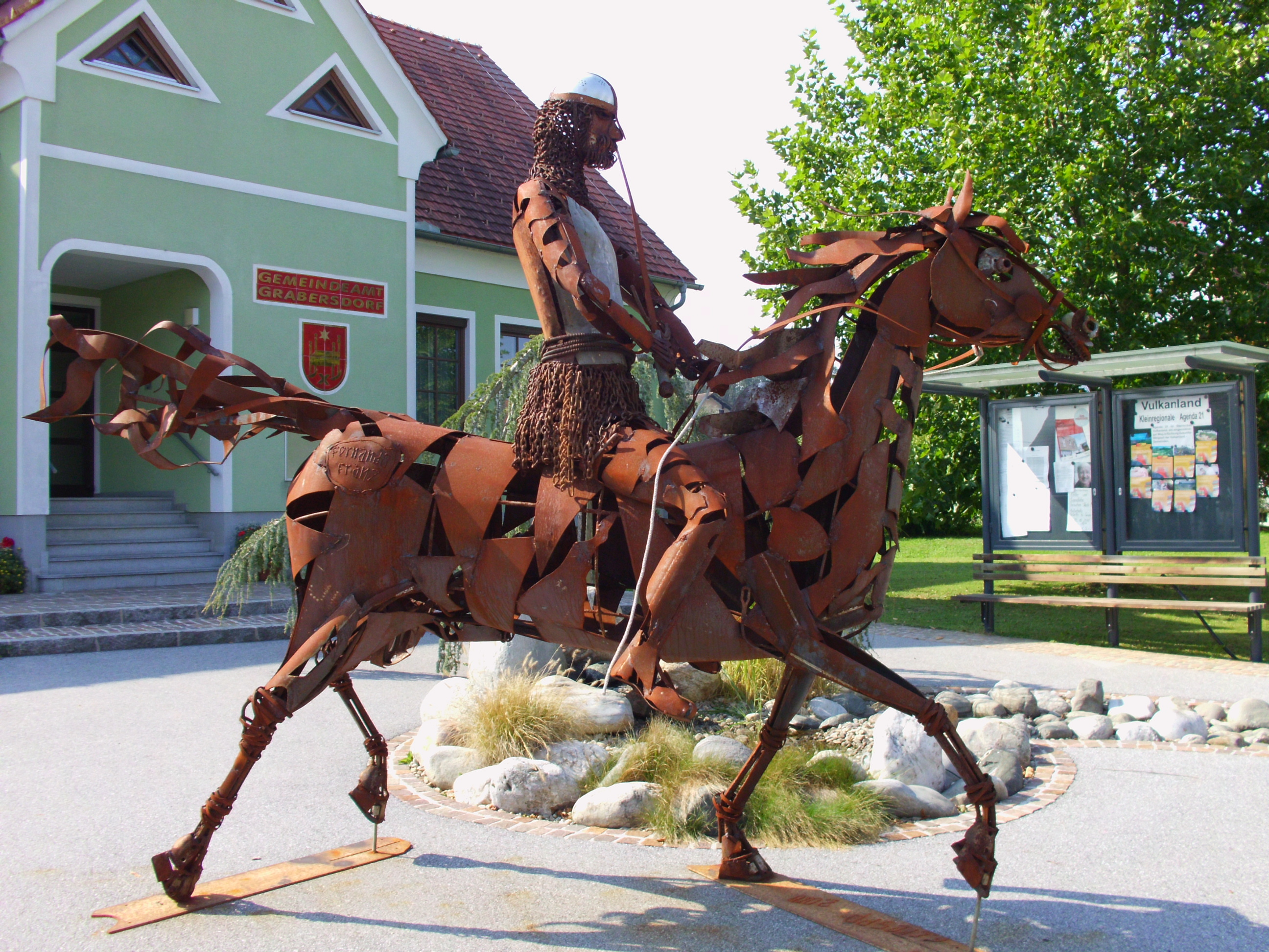 Skulptur des Eisernen Ritters von Grabersdorf vorm Gemeindehaus